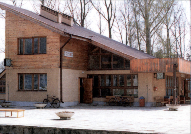 Dworzec w Suścu zmodernizowany przez Movares Polska Oddział w Lublinie. Budynek dworca